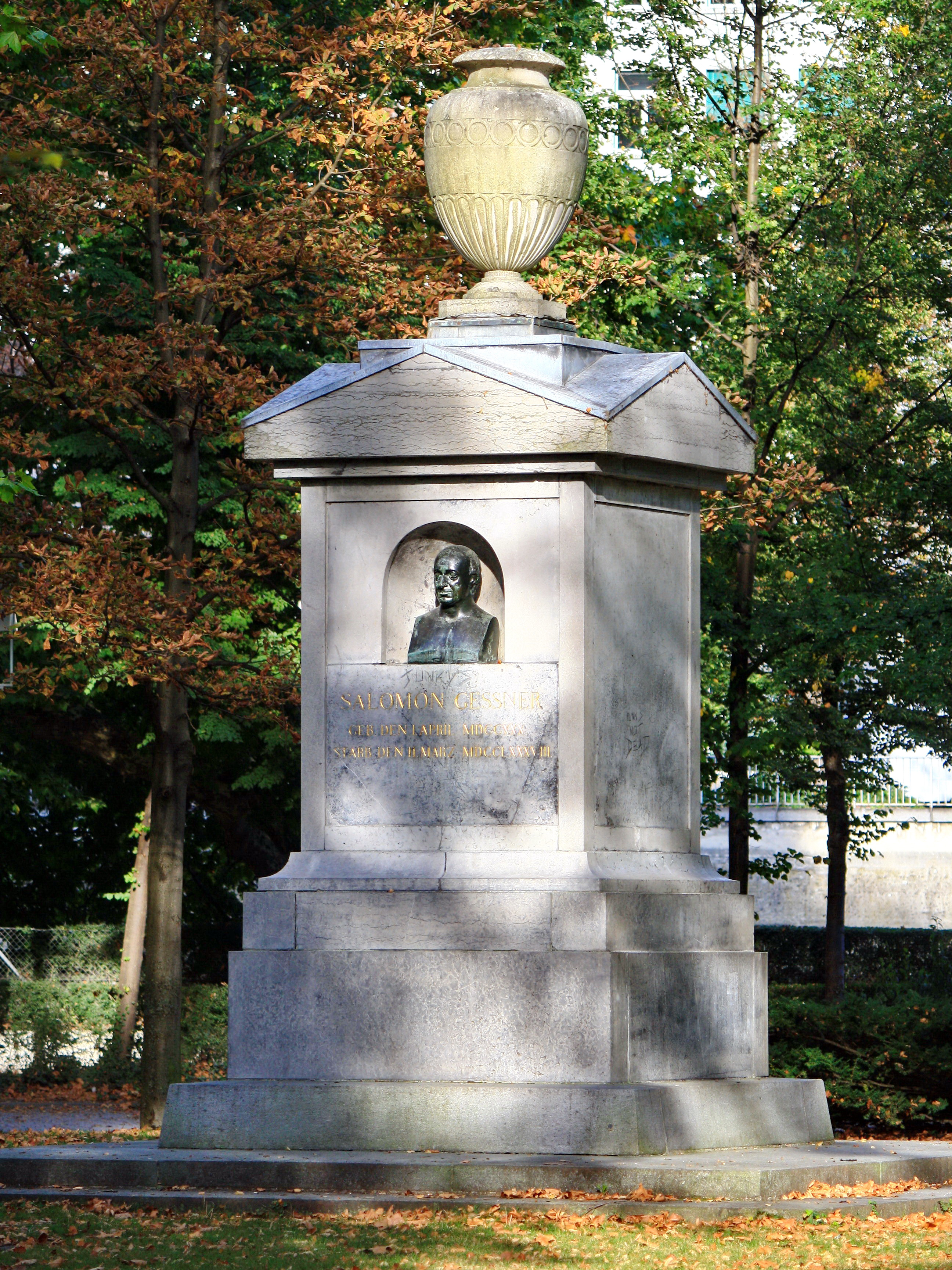 Salomon Gessner memorial at Platzspitz park in Zürich (Switzerland)